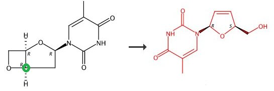 Mécanisme retrouvé grâce au site scifinder. La liaison entre le carbone entouré en vert et l'oxygène va se rompre.